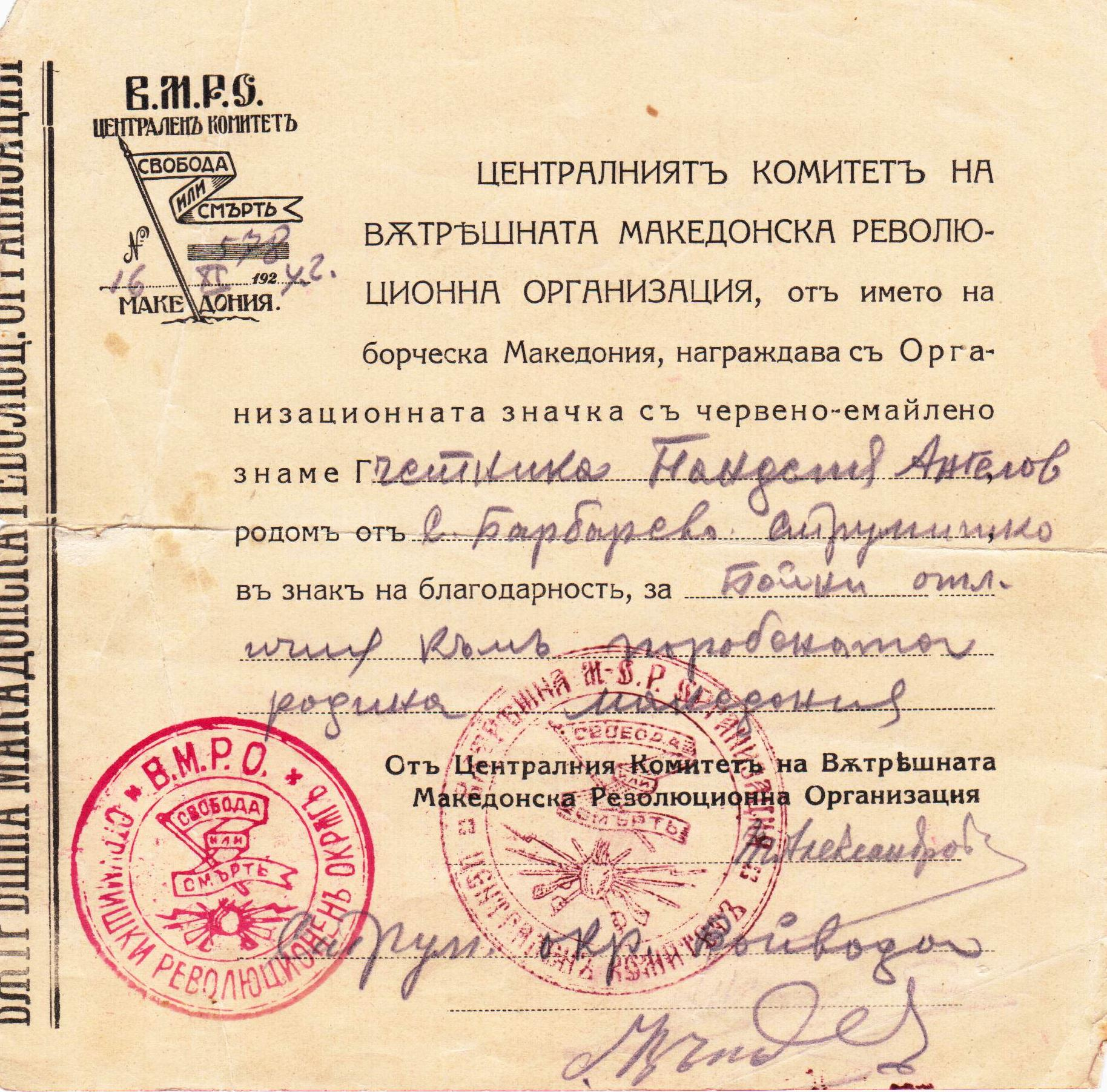 Грамота от ЦК на ВМРО